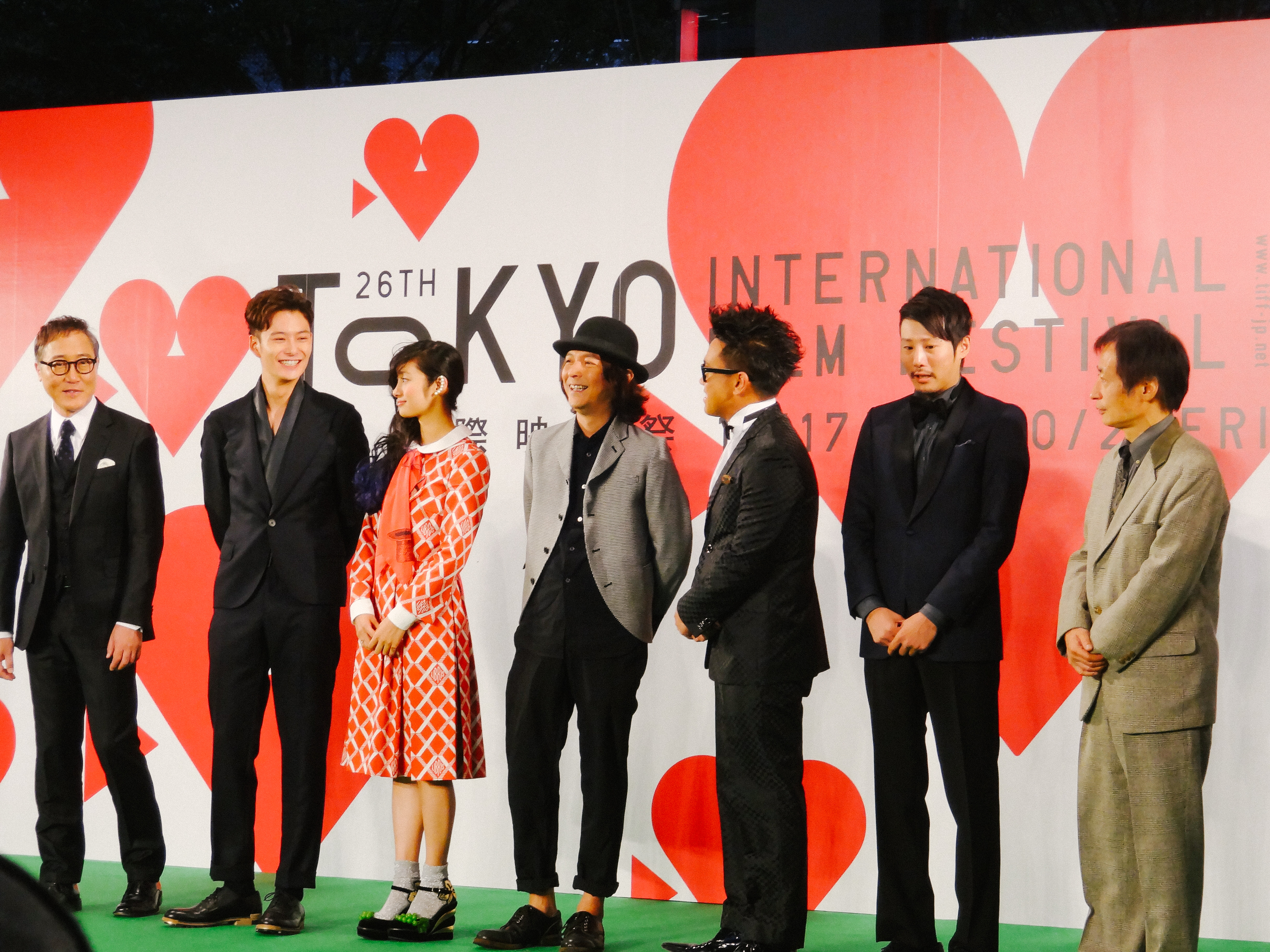 第26回 東京国際映画祭 岡田将生 忽那汐里 佐野史郎 河原雅彦 宮川大輔 奥山和由 (オー!ファーザー)